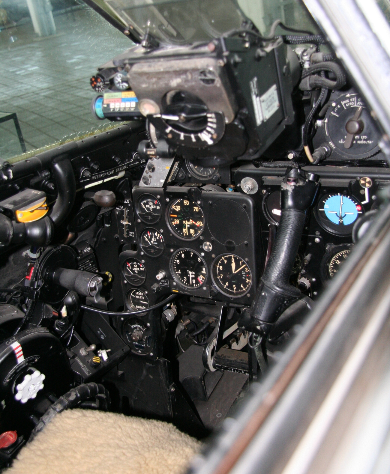 Cockpit einer DH-112 im Museum für Luftfahrt und Technik in Wernigerode